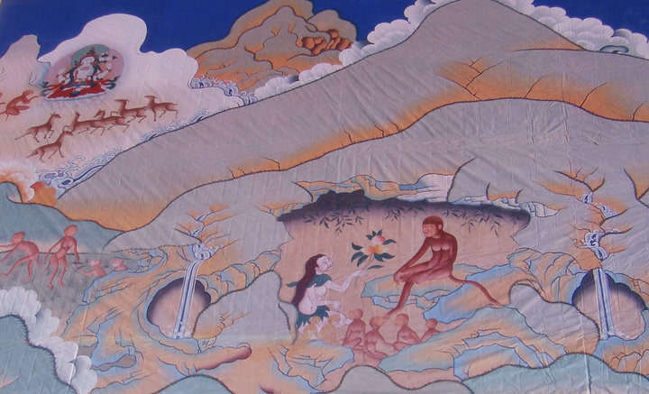 Représentation de Pha Trelgen Changchup Sempa, singe-ancêtre mythique du peuple tibétain.